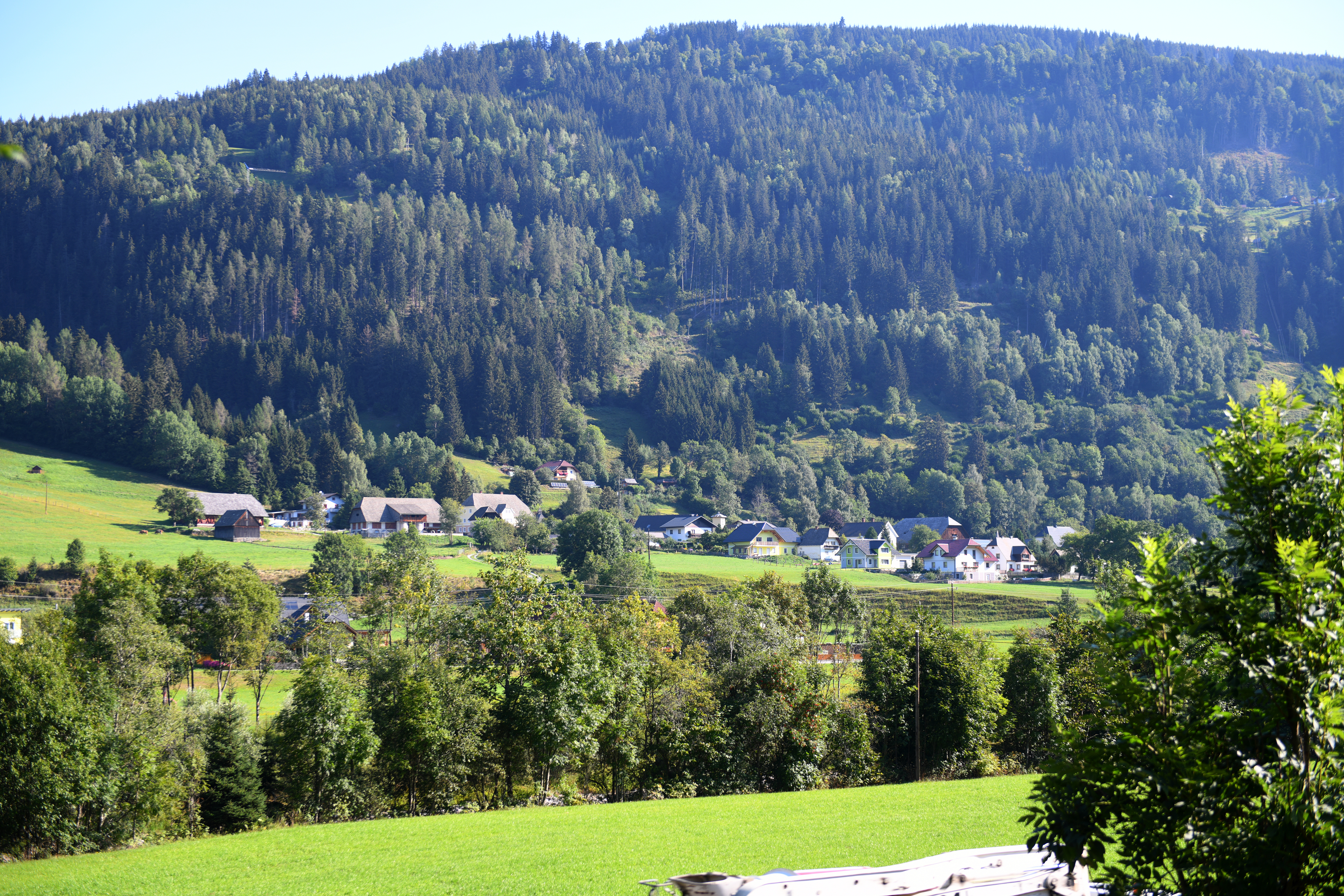 Die Ortschaft Einach in der Gemeinde Stadl-Predlitz, Steiermark